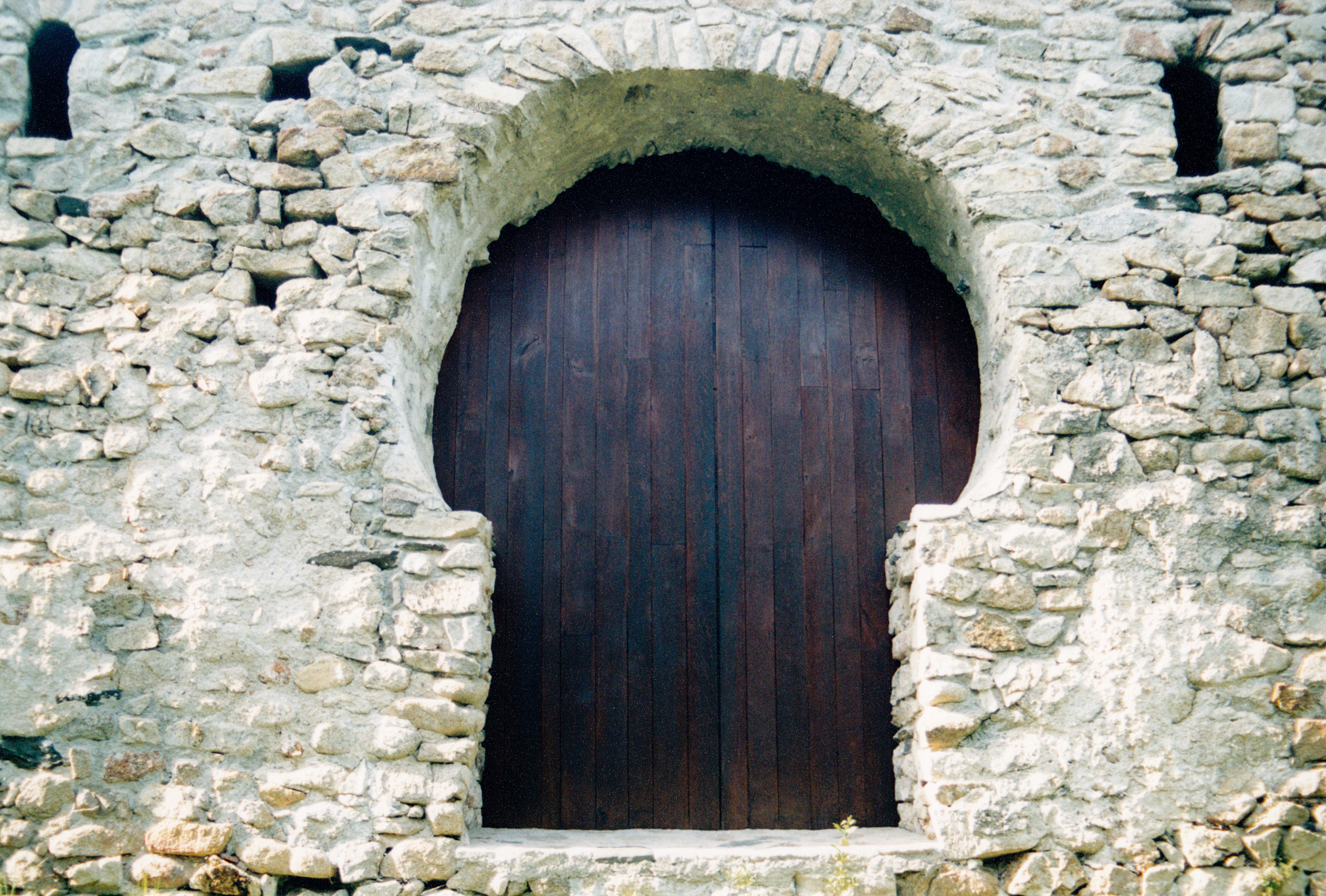 France - Fenouillèdes - Saint-Michel de Sournia (préroman) : portail méridional outrepassé